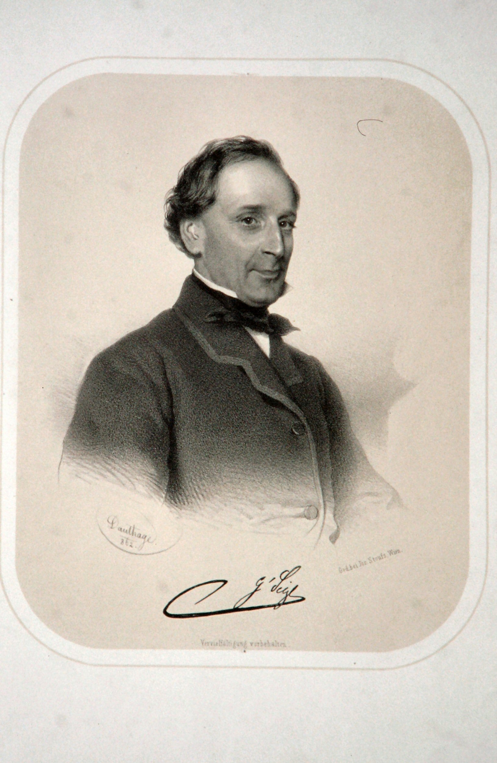 Georg Sigl (1811-1887), österreichischer Industrieller. Lithographie von Adolf Dauthage. 1862